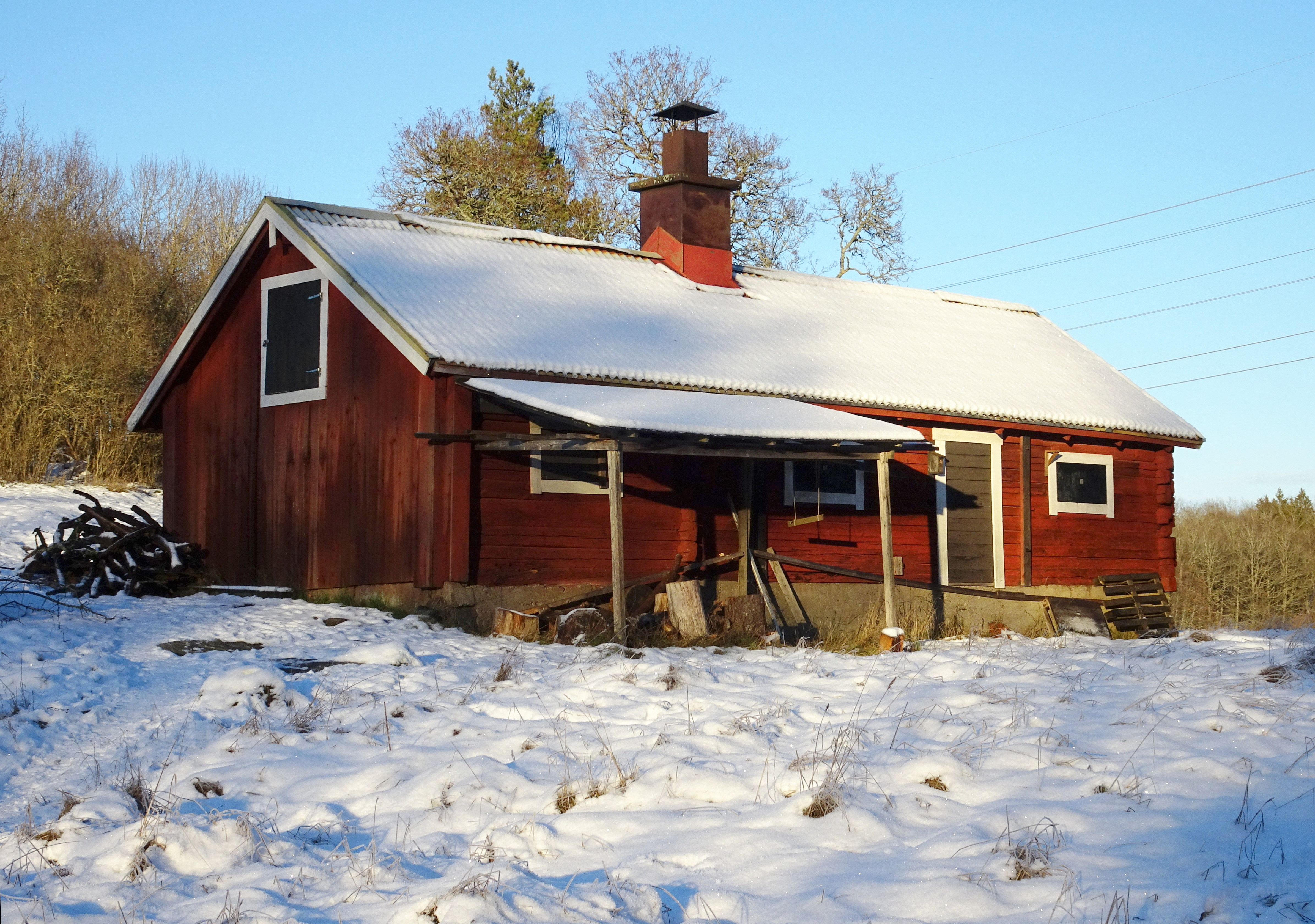 Torpet Fräkenbotten (uthuset) låg under Ågesta gård